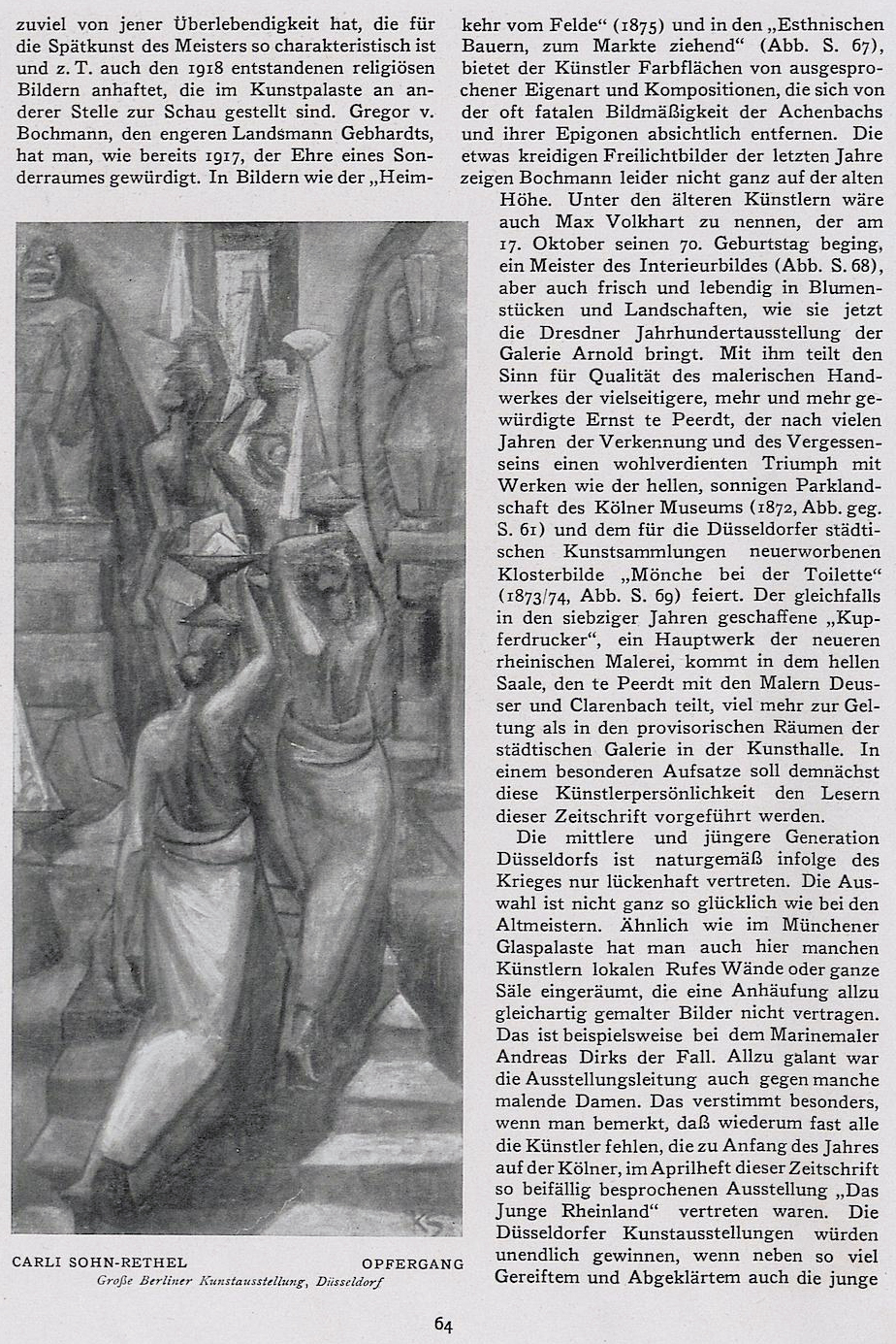 Karli Sohn-Rethel, Opfergang; Die Düsseldorfer Malerei auf der großen Kunstausstellung 1918 zu Düsseldorf; Die Kunst für Alle, vierunddreißigster Jahrgang, Heft 3/4, November 1918, Seite 64